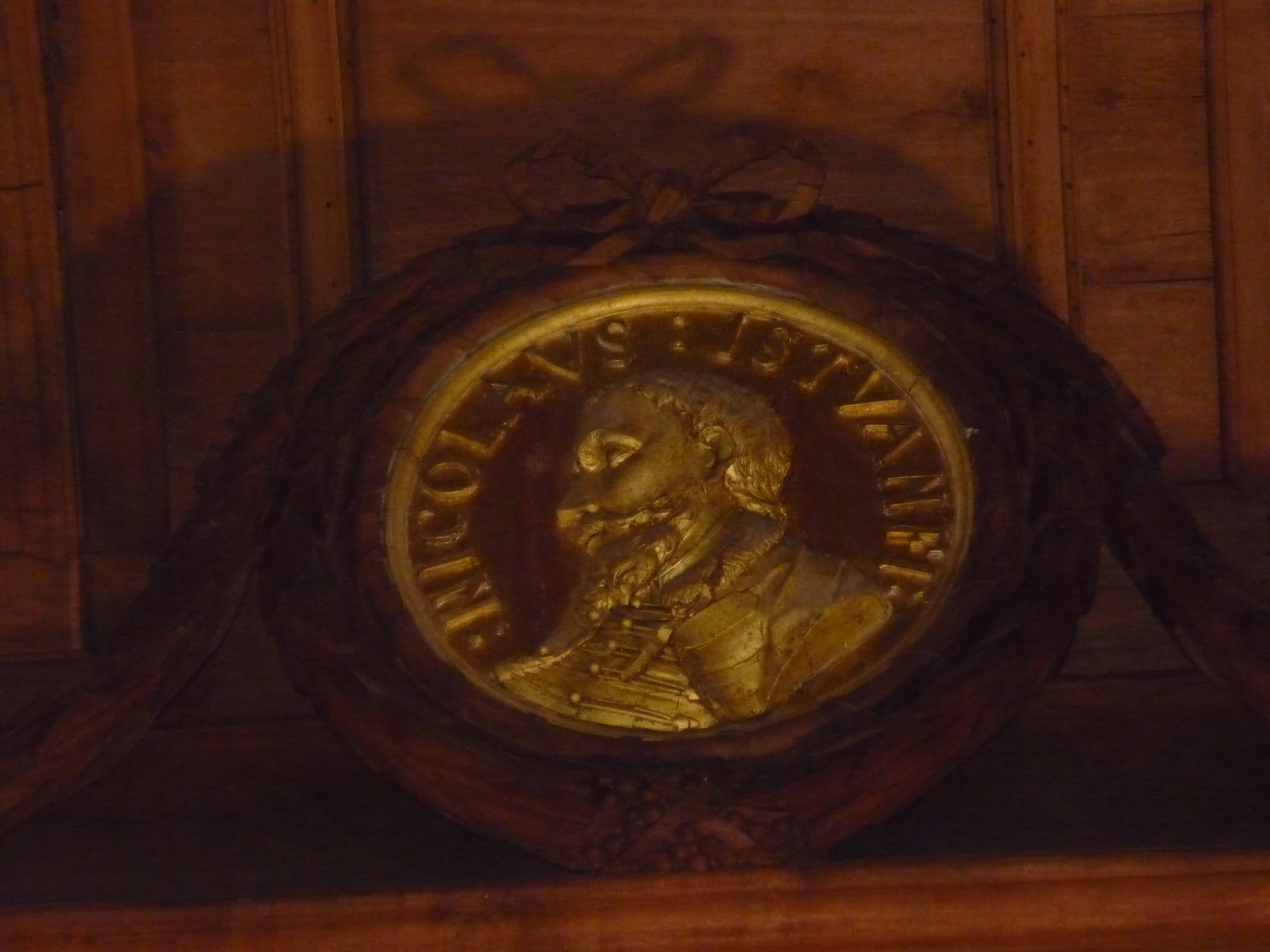 Istvánffy Miklóst ábrázoló dombormű az egri líceumben